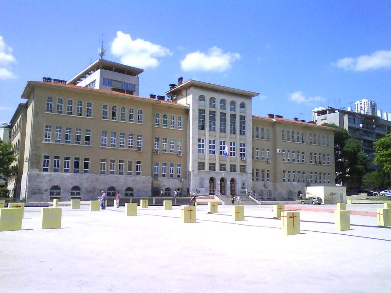 Osnovna škola Nikola Tesla